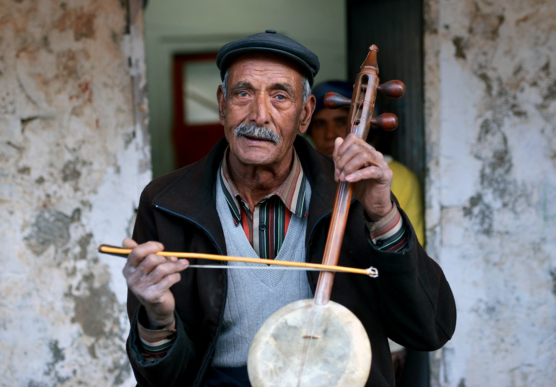 Kurdî: Dengbêj